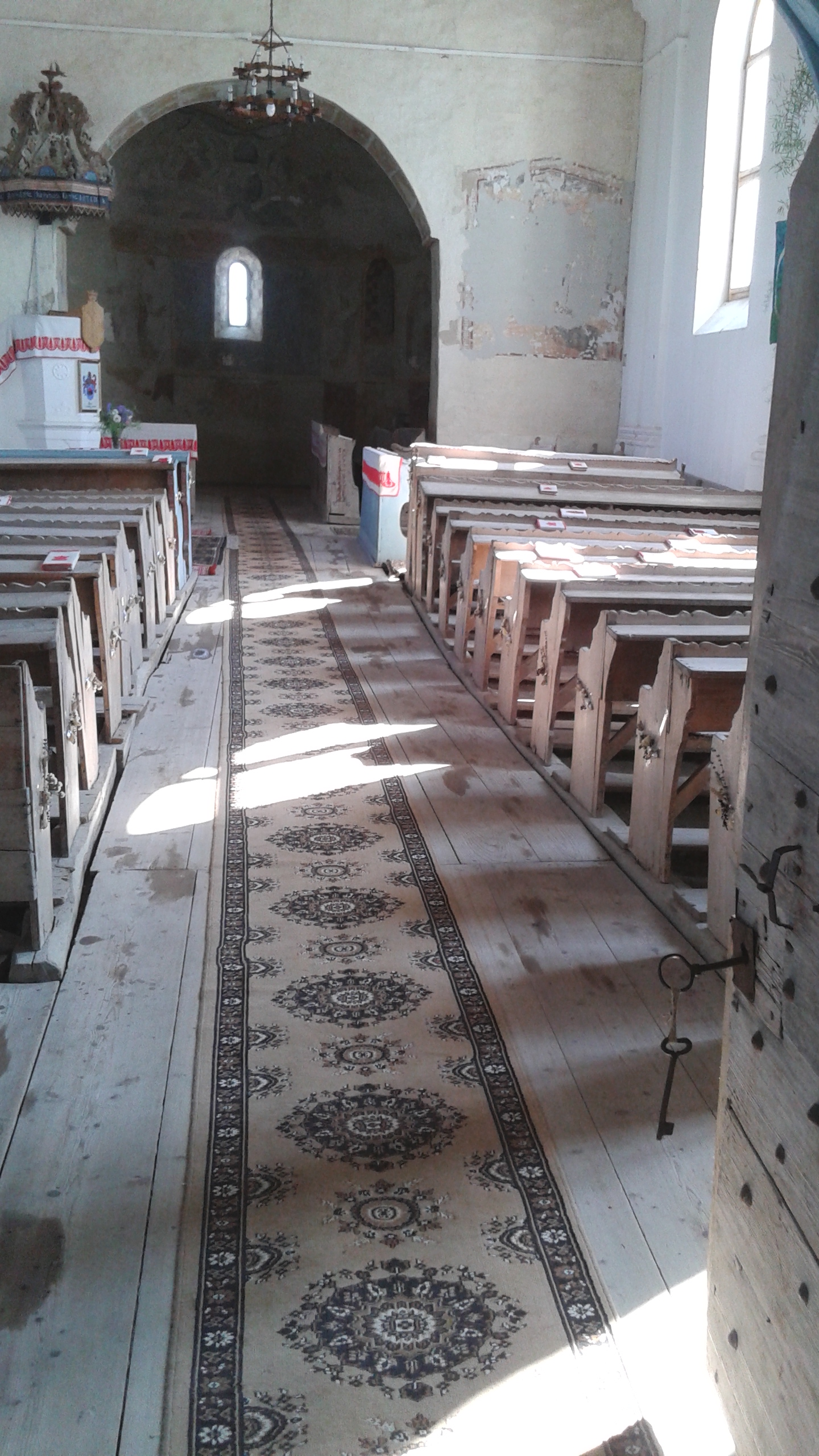 Interiorul bisericii unitariane